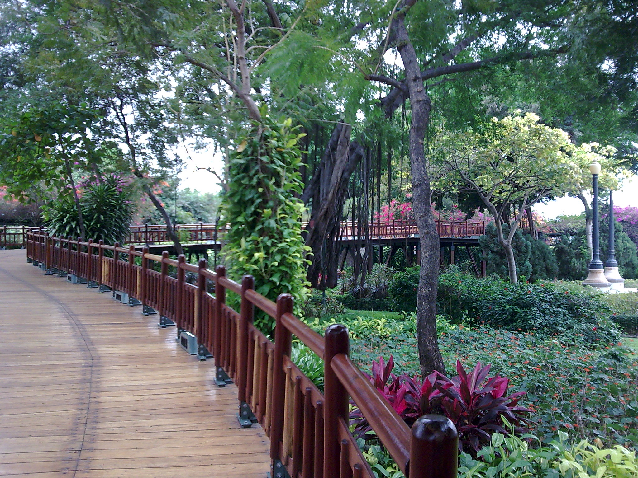 Jardines del Malecón 2000 en Guayaquil